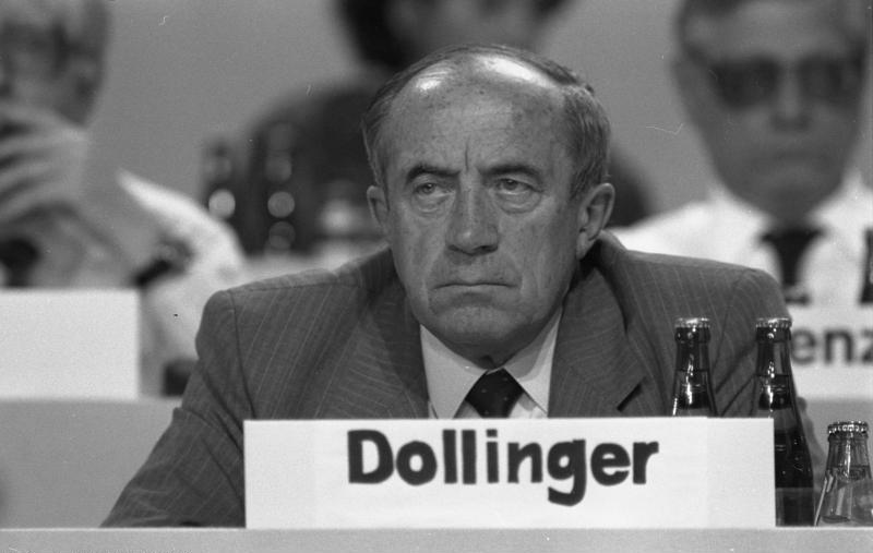 7./8.10.1986 34. Bundesparteitag der CDU in der Rheingoldhalle, Mainz (6.-8.10.1986)